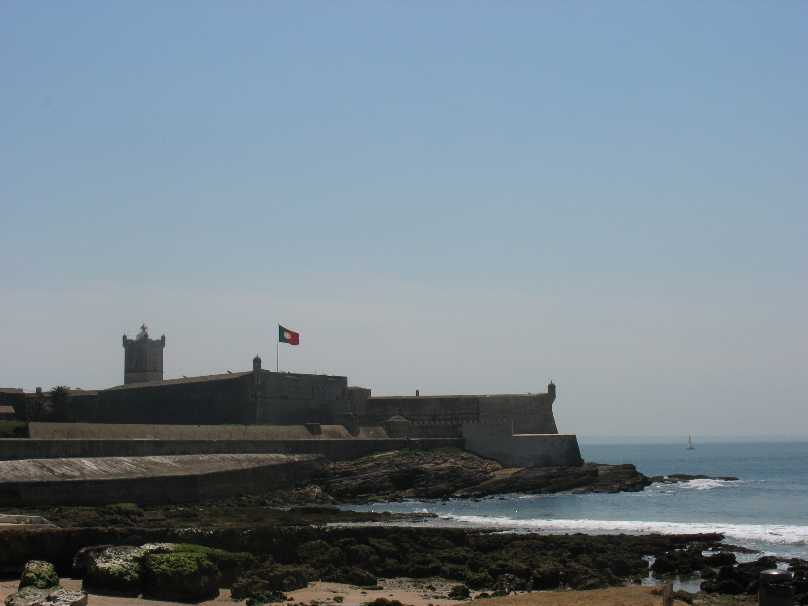 Fortress of São Julião da Barra, Oeiras, Portugal